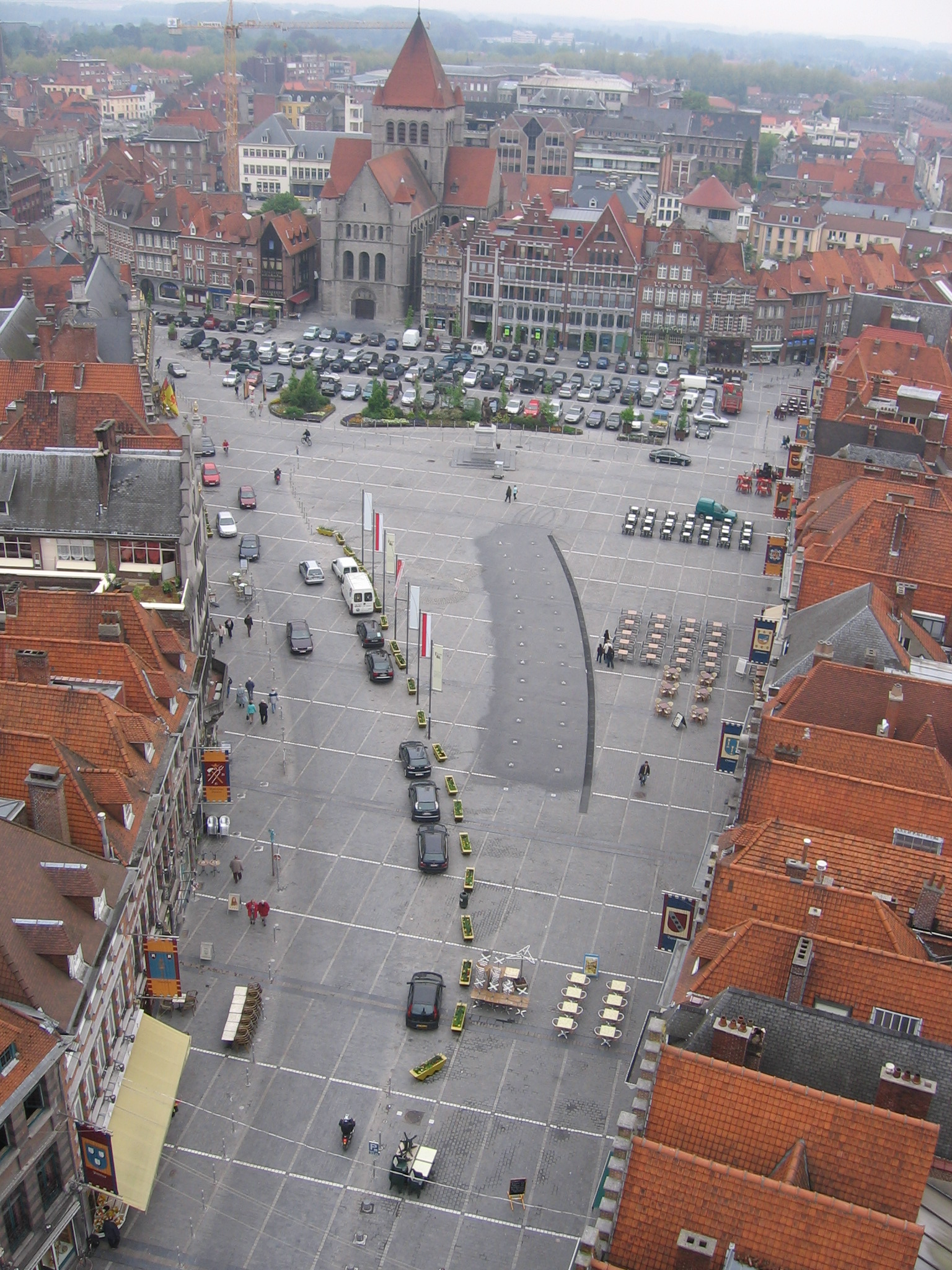 Kuva Tournain kaupungista, Belgiasta. Kuva on otettu kellotornista.